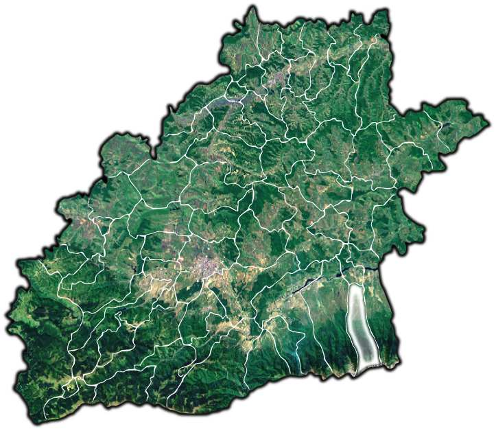 Cartisoara jud Sibiu.